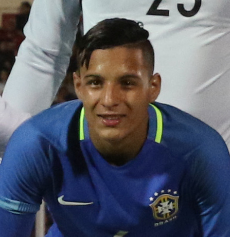 Riobamba, Ecuador, 18 enero 2017 (Andes).- El combinado ecuatoriano dirigido por Javier Rodríguez cayó 1-0 este miércoles ante Brasil en el marco de la primera jornada del Grupo A del Campeonato Sudamericano Sub 20 Ecuador 2017, durante el partido jugado en el estadio Olímpico de Riobamba (centro andino), abarrotado de hinchas. ANDES/Micaela Ayala V.